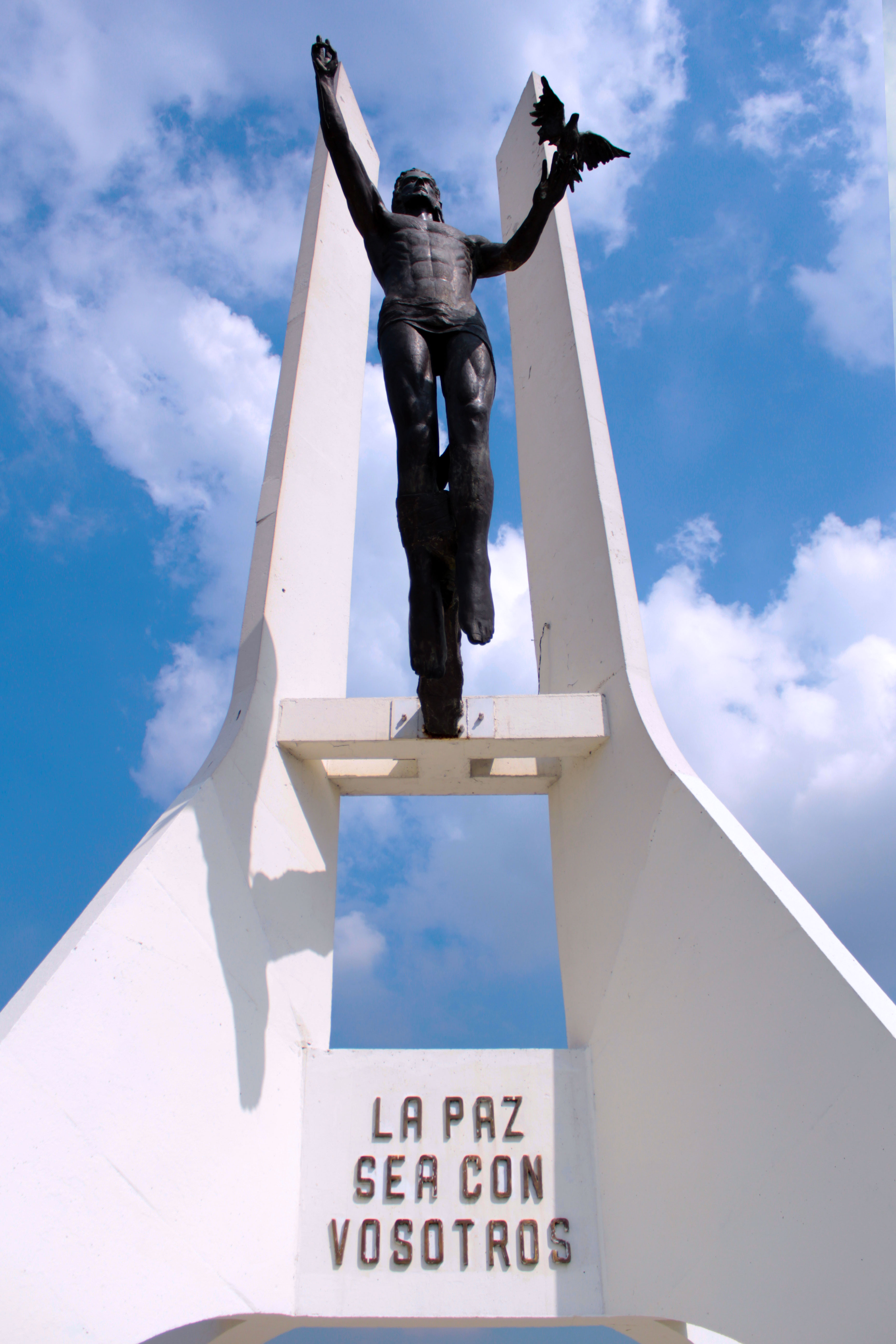 Monumento referente y muy marcado fomentando la Paz